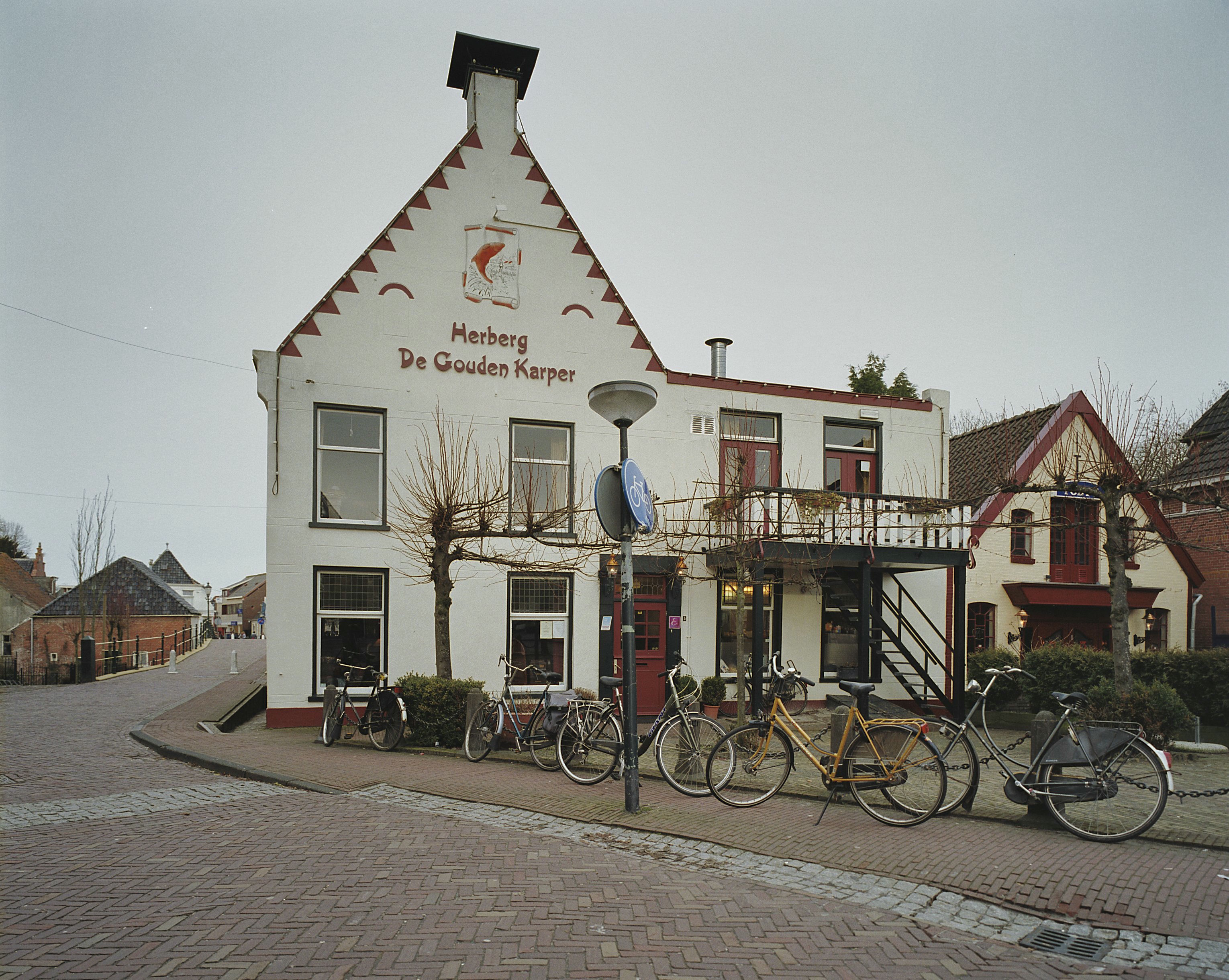 Herberg De Gouden Karper: Overzicht voorgevel